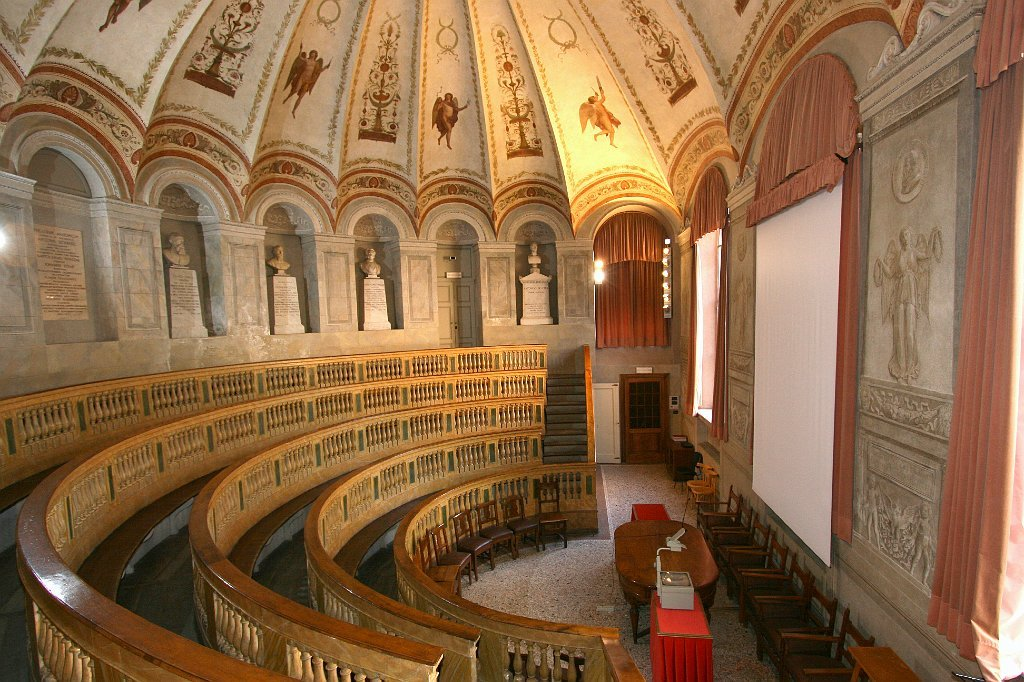 Intitolata al celebre anatomo-chirurgo Antonio Scarpa, docente di anatomia dell'Ateneo pavese. Conosciuta come "Teatro anatomico" fu progettata nel 1785 da Giuseppe Piermarini e portata a termine l'anno successivo da Leopoldo Pollack.